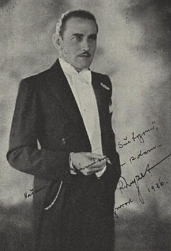 Rudolf Myzet, český herec, režisér a scenárista